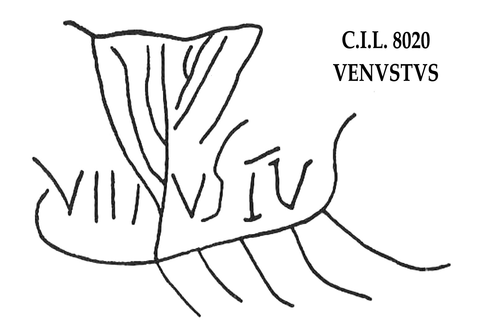 Inscripción pompeyana